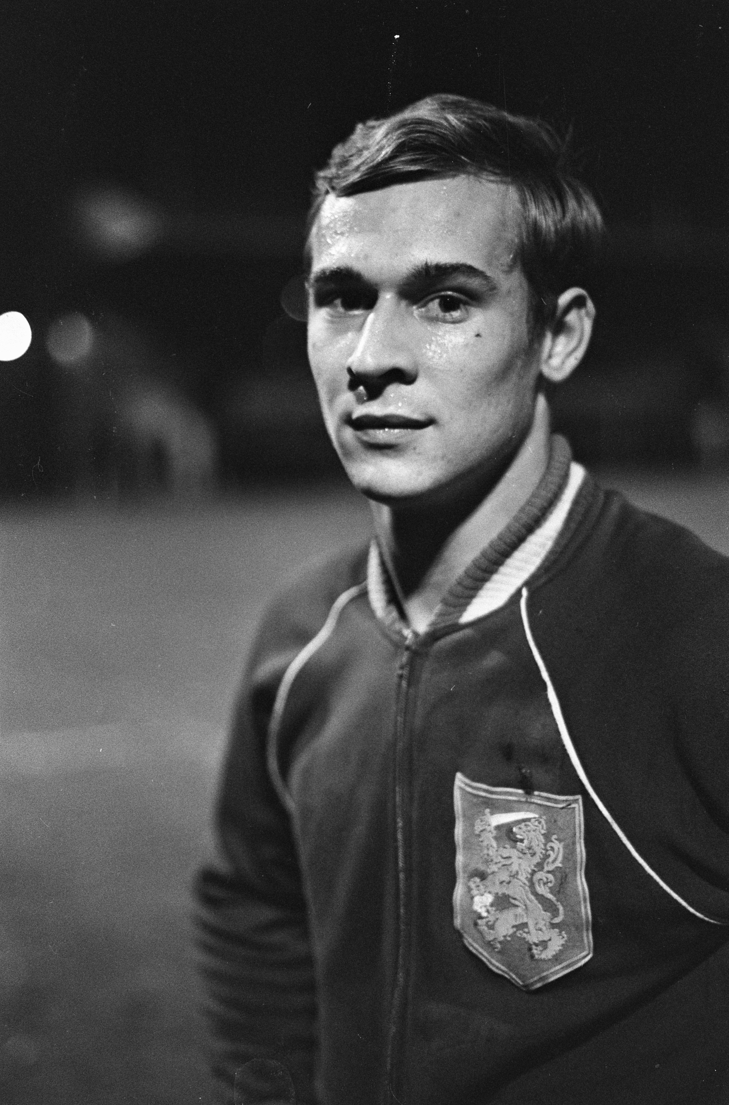 Jong Oranje tegen Polen 3-2. Keeper Jan van Beveren Datum 8 november 1967